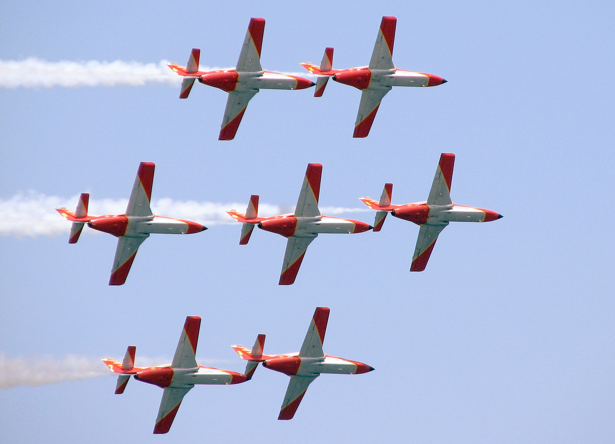 Patrulla Águila. Festival aéreo de Gijón, España. 2007 CASA-101